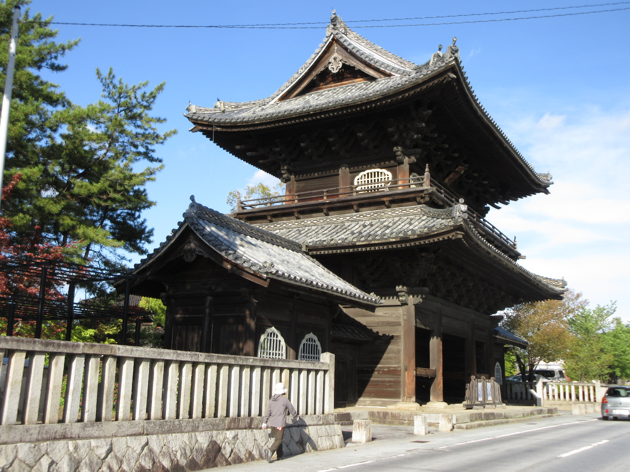 大樹寺三門（岡崎市鴨田町）